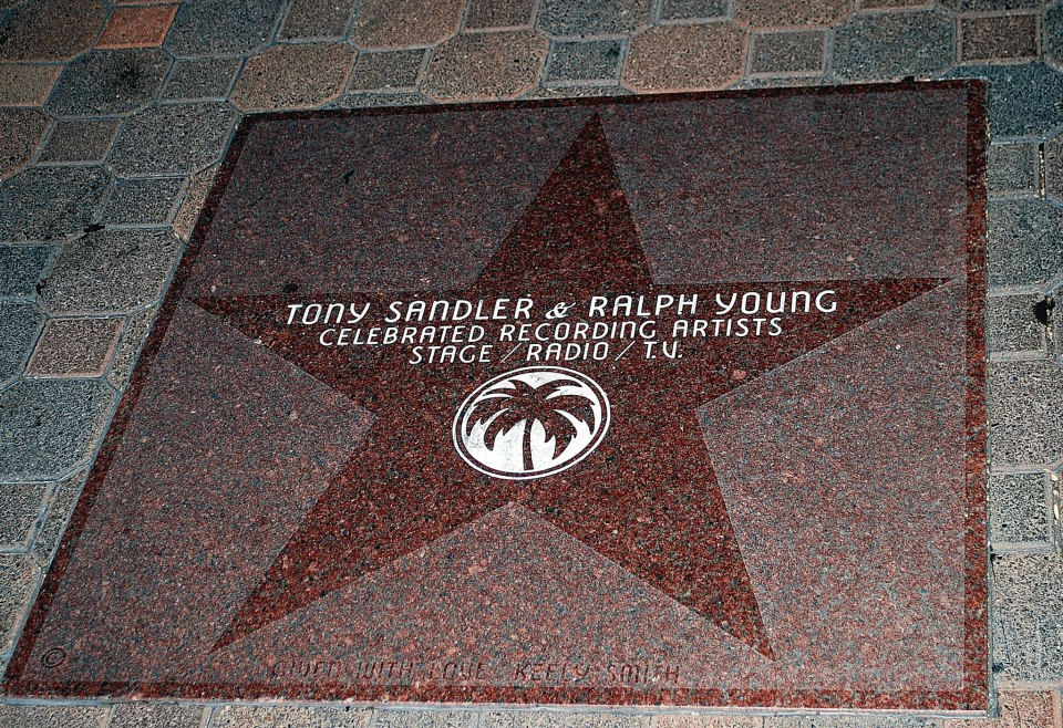 De 'Ster' op de 'Walk of Fame' in Palm Springs (CAL) van Sandler & Young, Celebrated recording artists. Genomen Aug. 2012